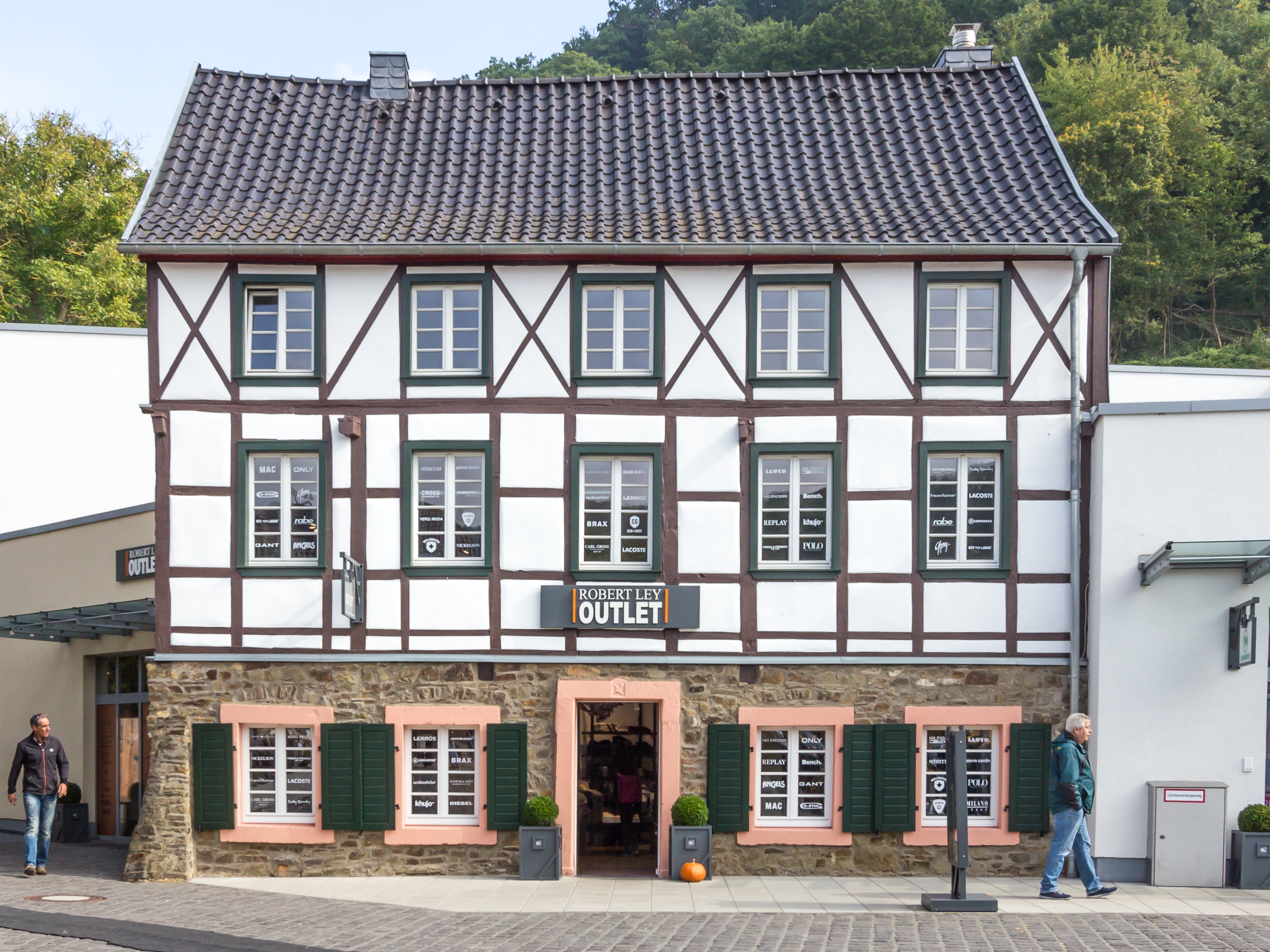 Robert Ley Outlet, Trierer Straße 1, Bad Münstereifel.